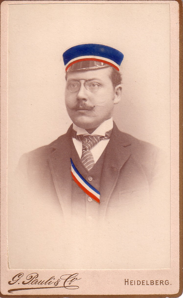 Albert Ahn als Heidelberger Rhenane